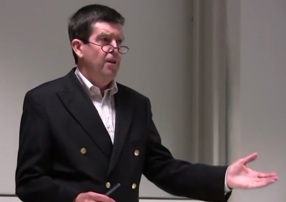 پروفسور هیلمن